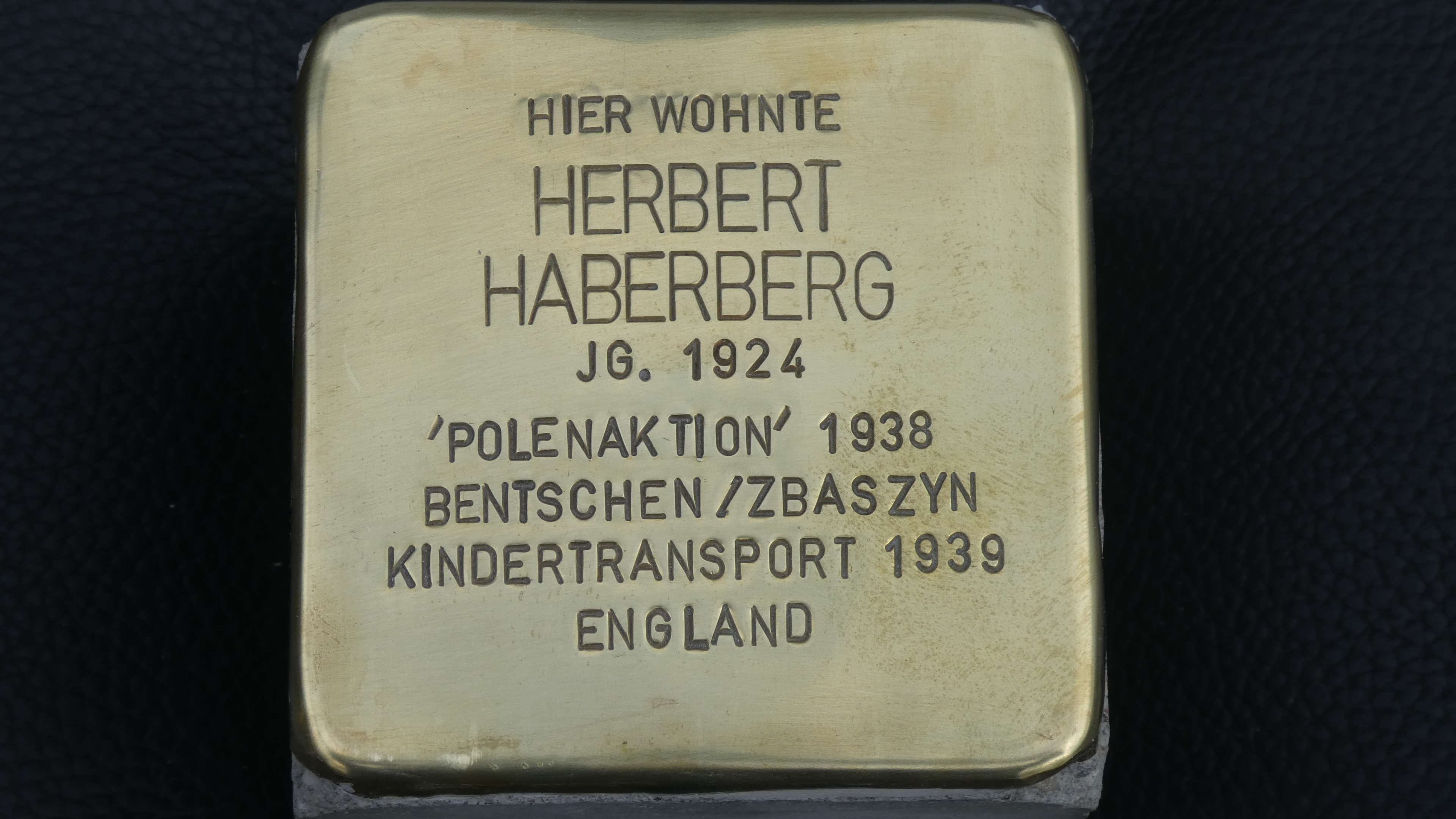 Herbert Haberberg, 2018